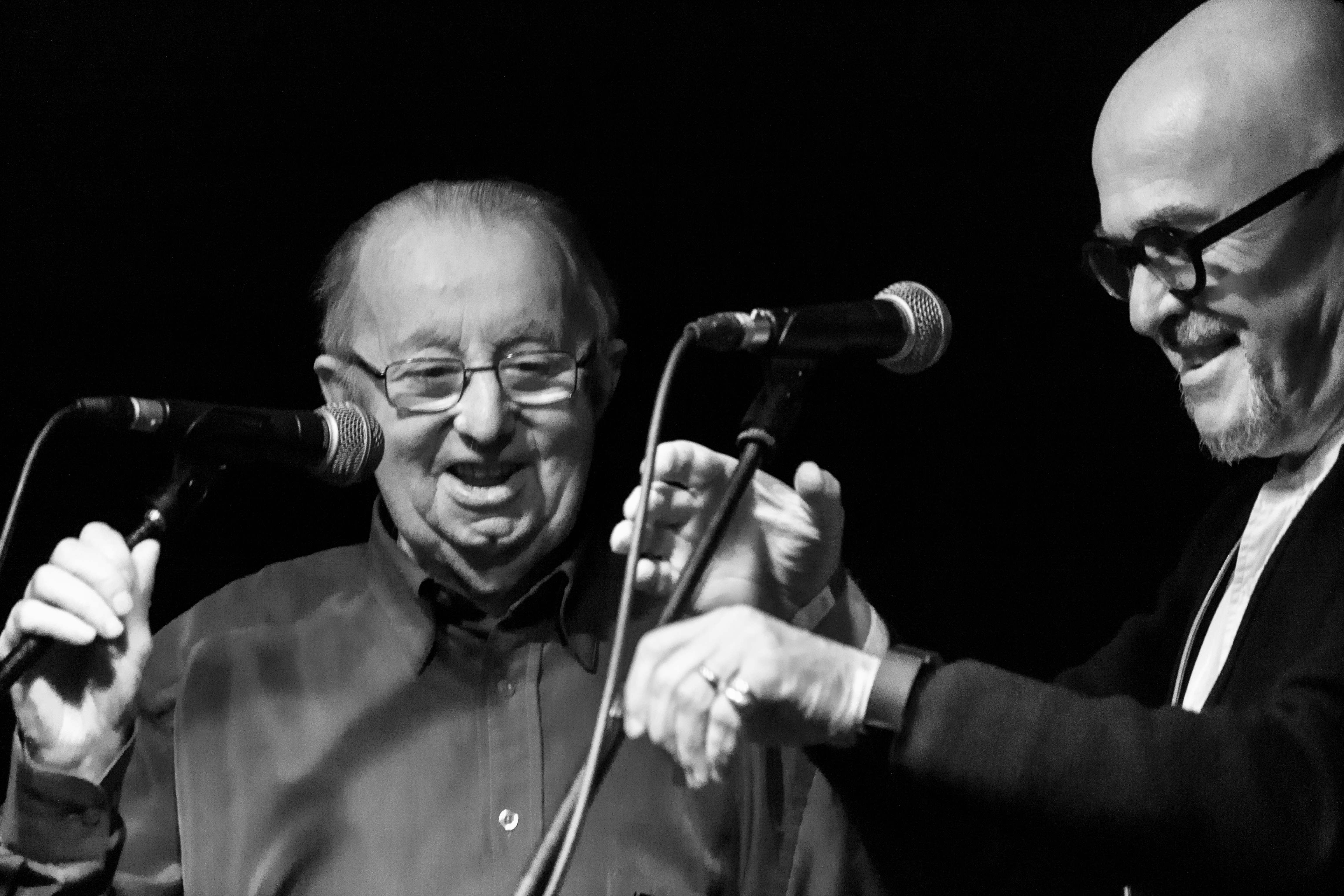 Fest-deiz et fest-noz du 5ème « Entre-deux Fest » organisé le 30 décembre 2016 à Poullaouen par Dañs-tro pour fêter les 26 ans de scène d'Annie Ebrel et Nolùen Le Buhé, célèbre duo de kan ha diskan.